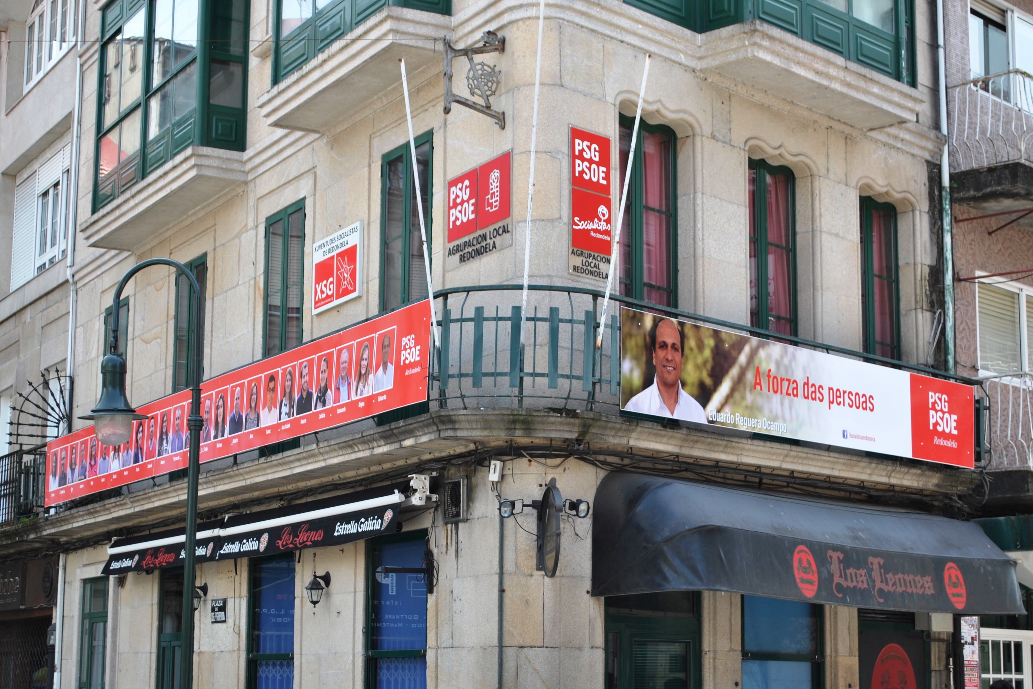 Véxase o título e as categorías.